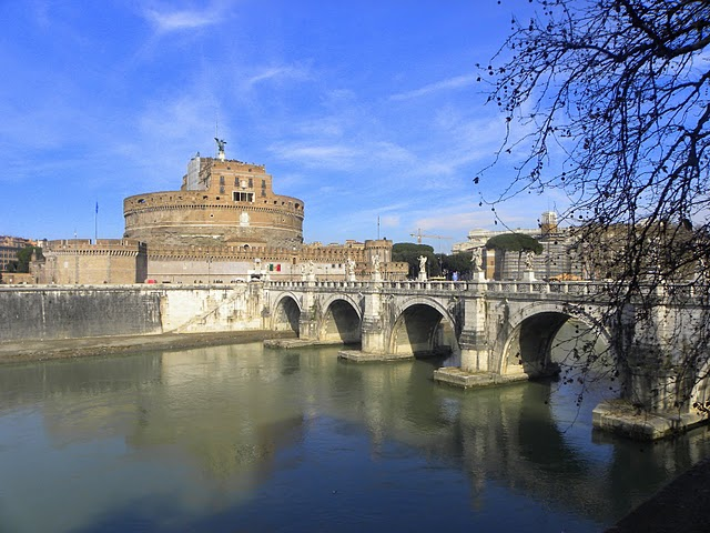 Roma